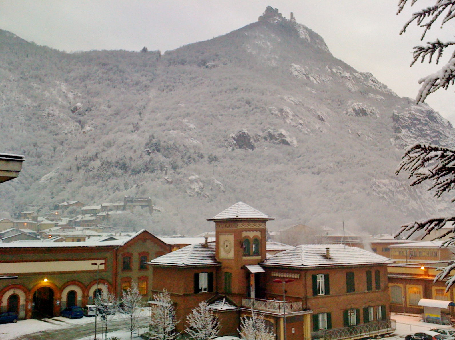 Foto di Sant'Ambrogio di Torino - Borgo Superiore e Sacra di San Michele